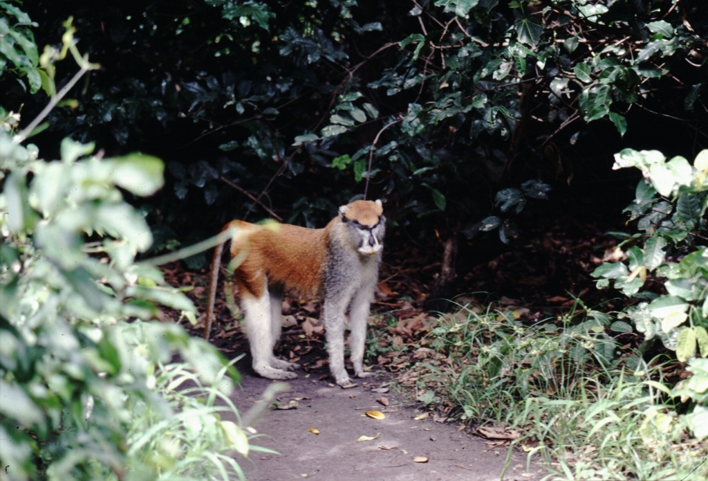 Husarenaffe (Erythrocebus patas) im Abuko Nature Reserve